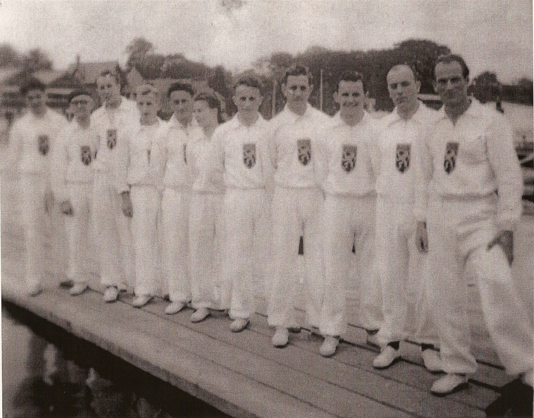 Julien Bogaert, de derde van links, tijdens de Olympische Zomerspelen van 1948 in London.